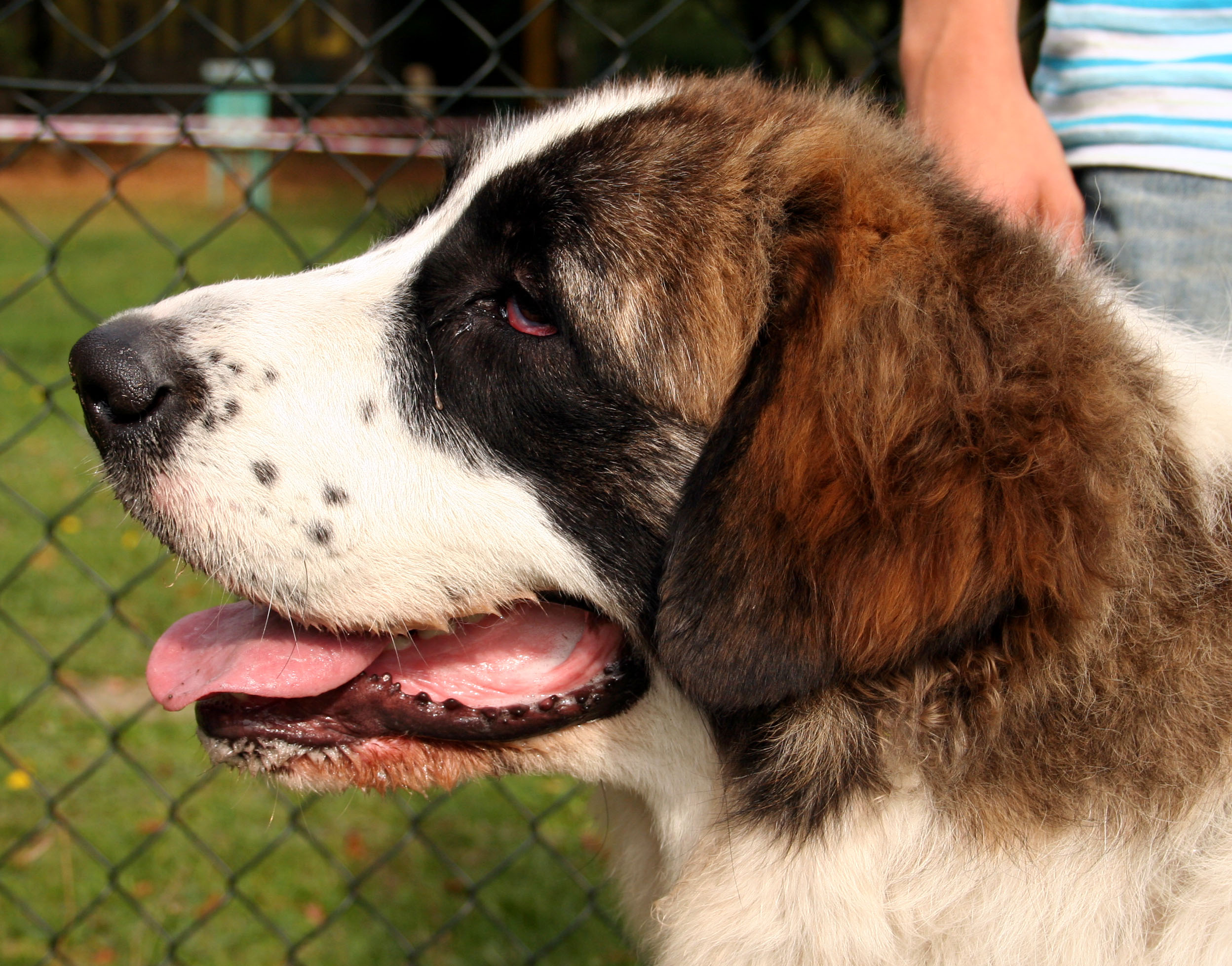 Mastif pirenejski na wystawie krajowej w Rybniku - Kamineiu